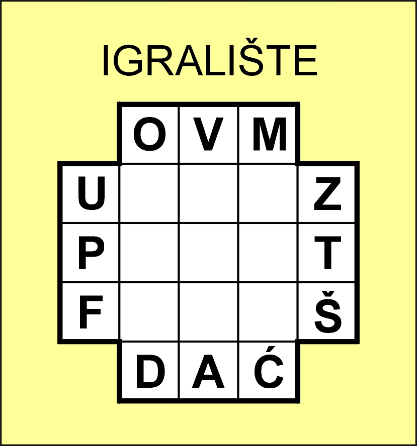 Enigmatsko srdašce od riječi IGRALIŠTE